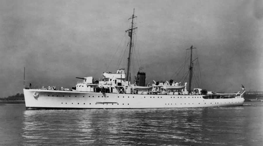 Die indische Sloop Indus der Royal Indian Navy